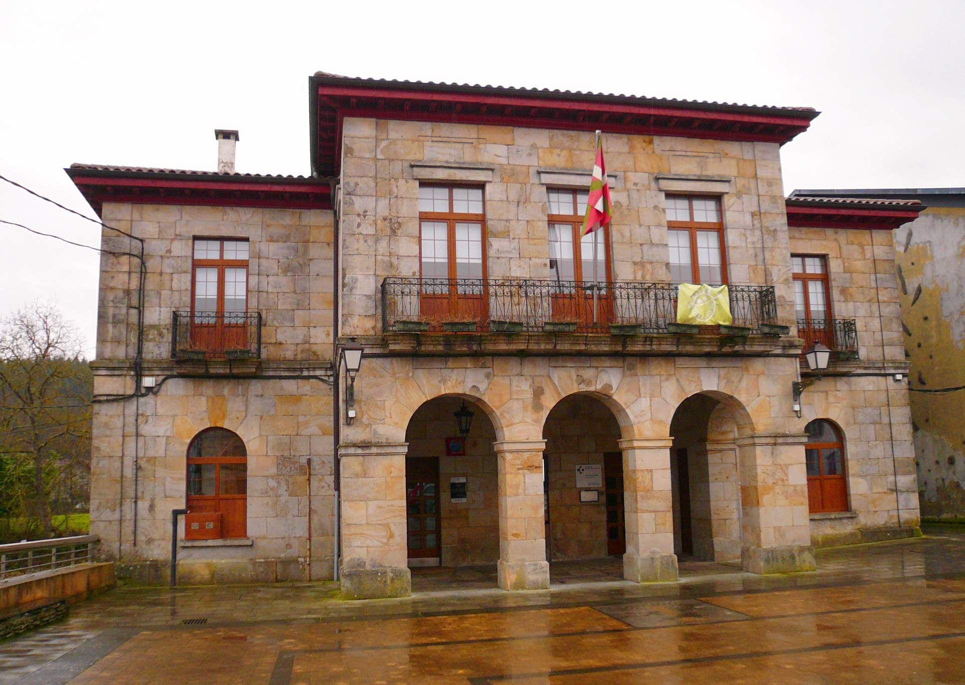 Ayuntamiento de Ubide (Vizcaya)